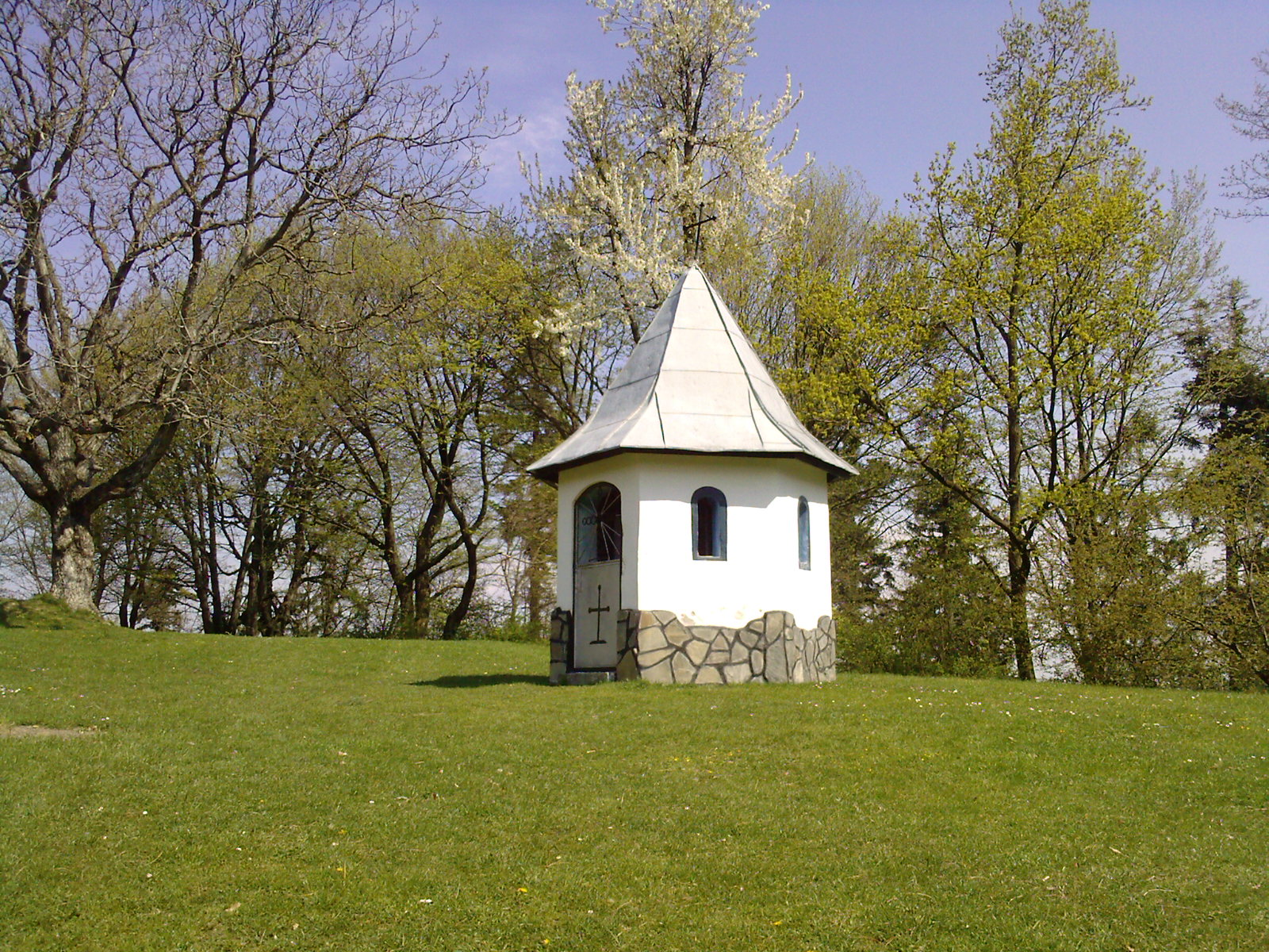 Troiţa de pe Pleaşa, cartier Dârste, Braşov